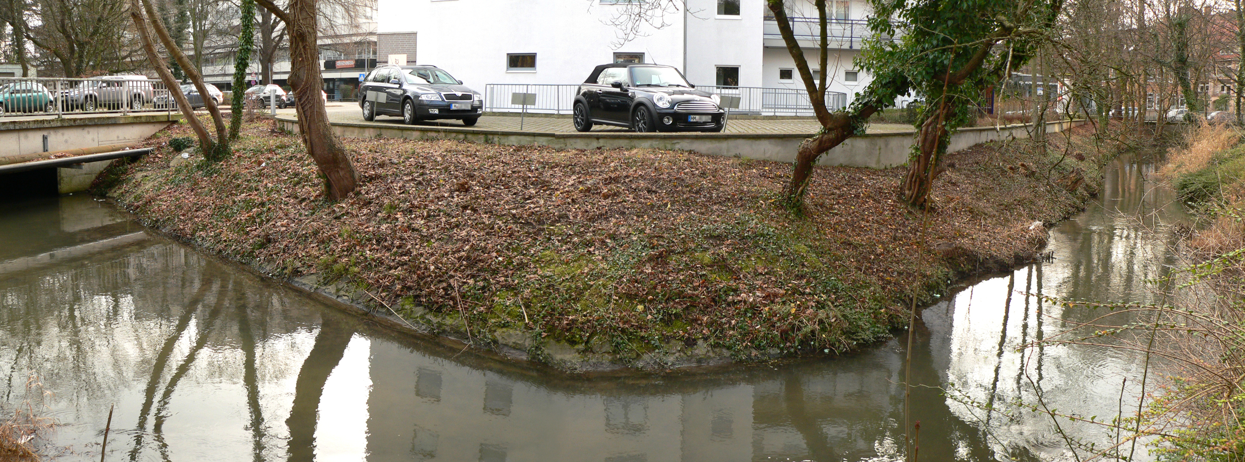 Die Hamel, auch Festungshamel genannt, am spitzwinkligen Glacis des äußeren Walls am früheren Ravelin Eduard August der Stadtbefestigung Hameln